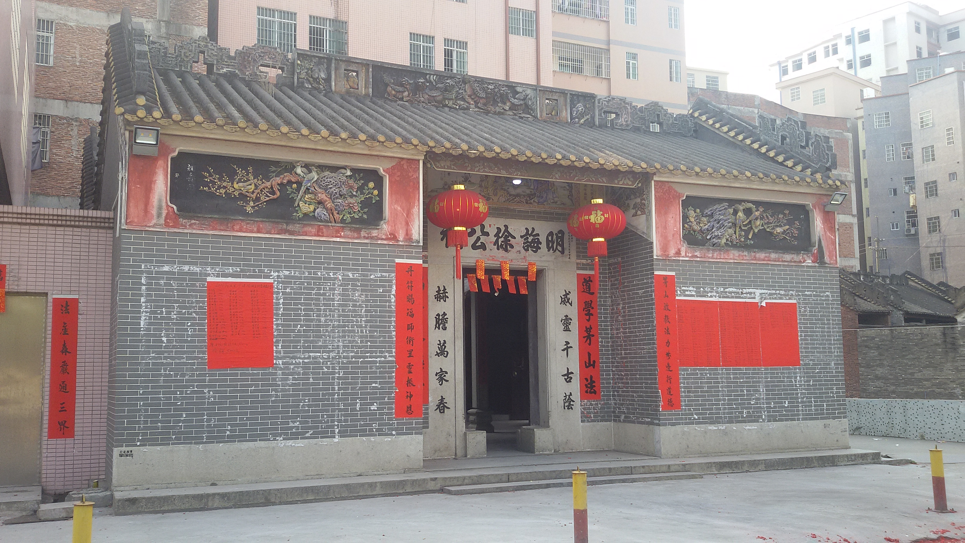 粵語: 明誨徐公祠